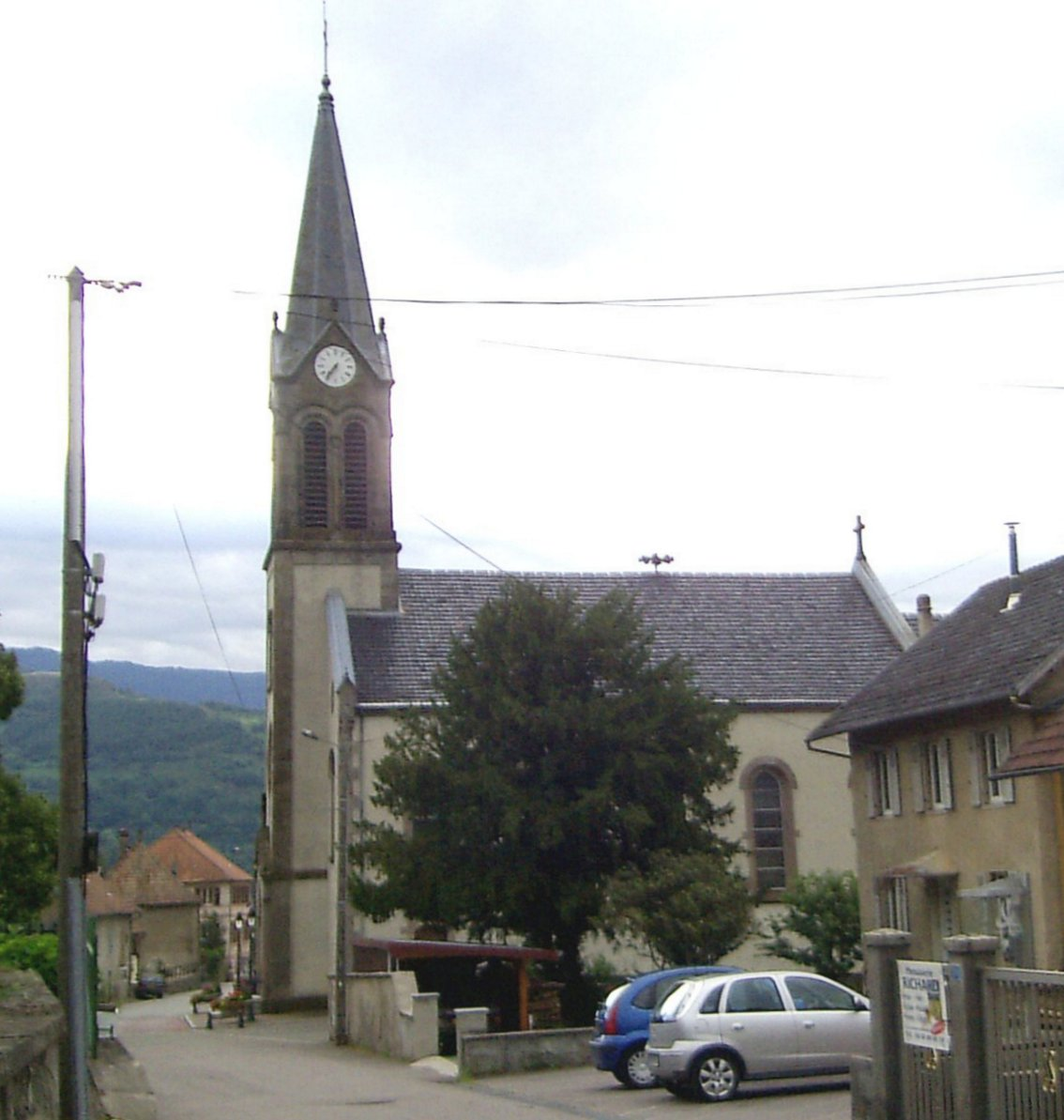 L'église Saint-Dominique à Mitzach